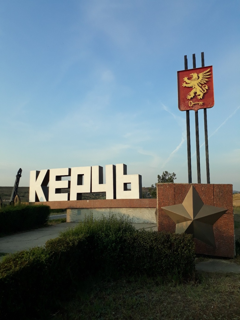 стелла Керчь (Крым)